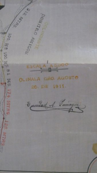 La firma de Trinidad Paniagua, estampada en un mapa de la época